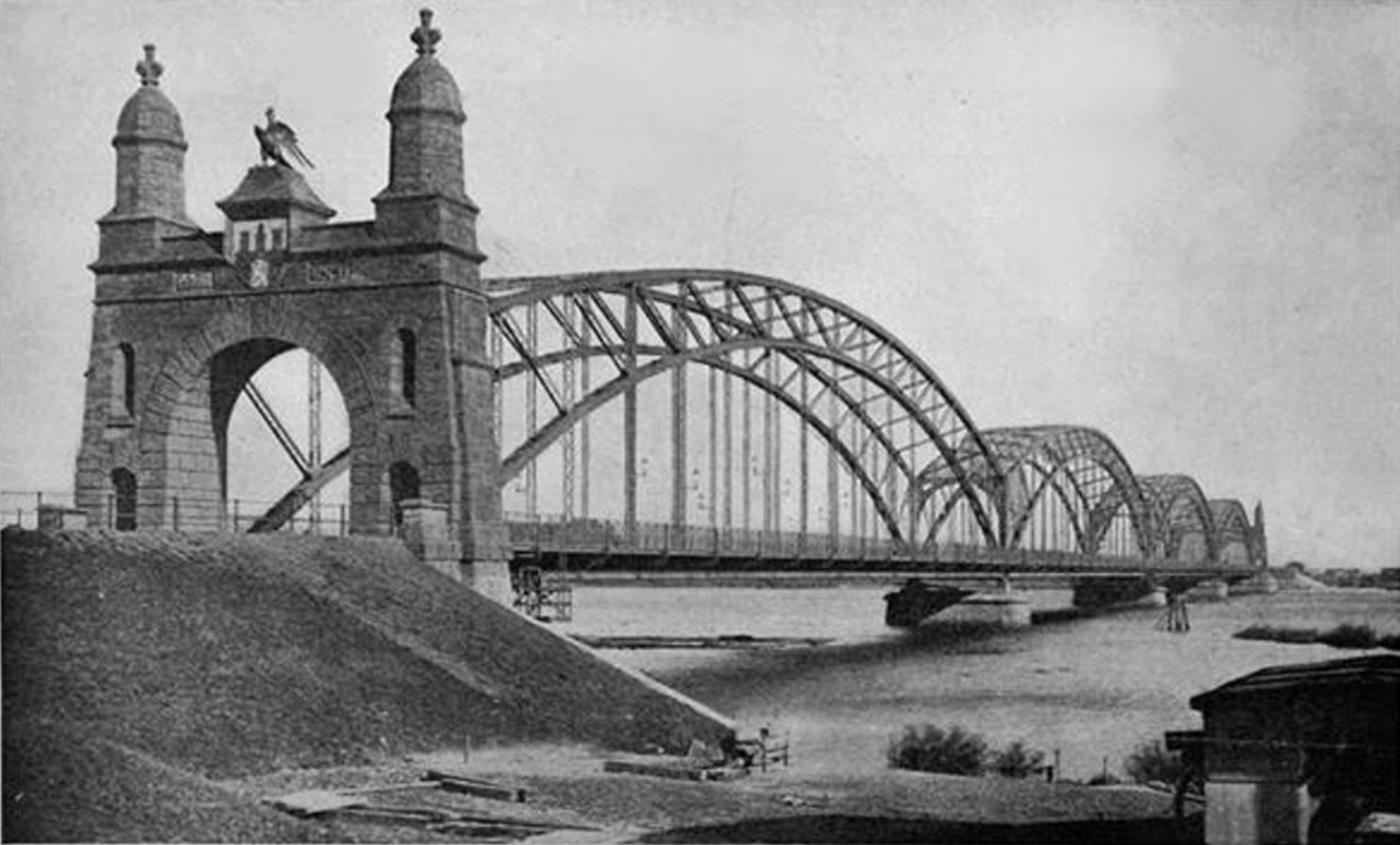 Straßen-Süderelbbrücke zwischen den damals preussichen Städten Harburg und Wilhelmsburg.